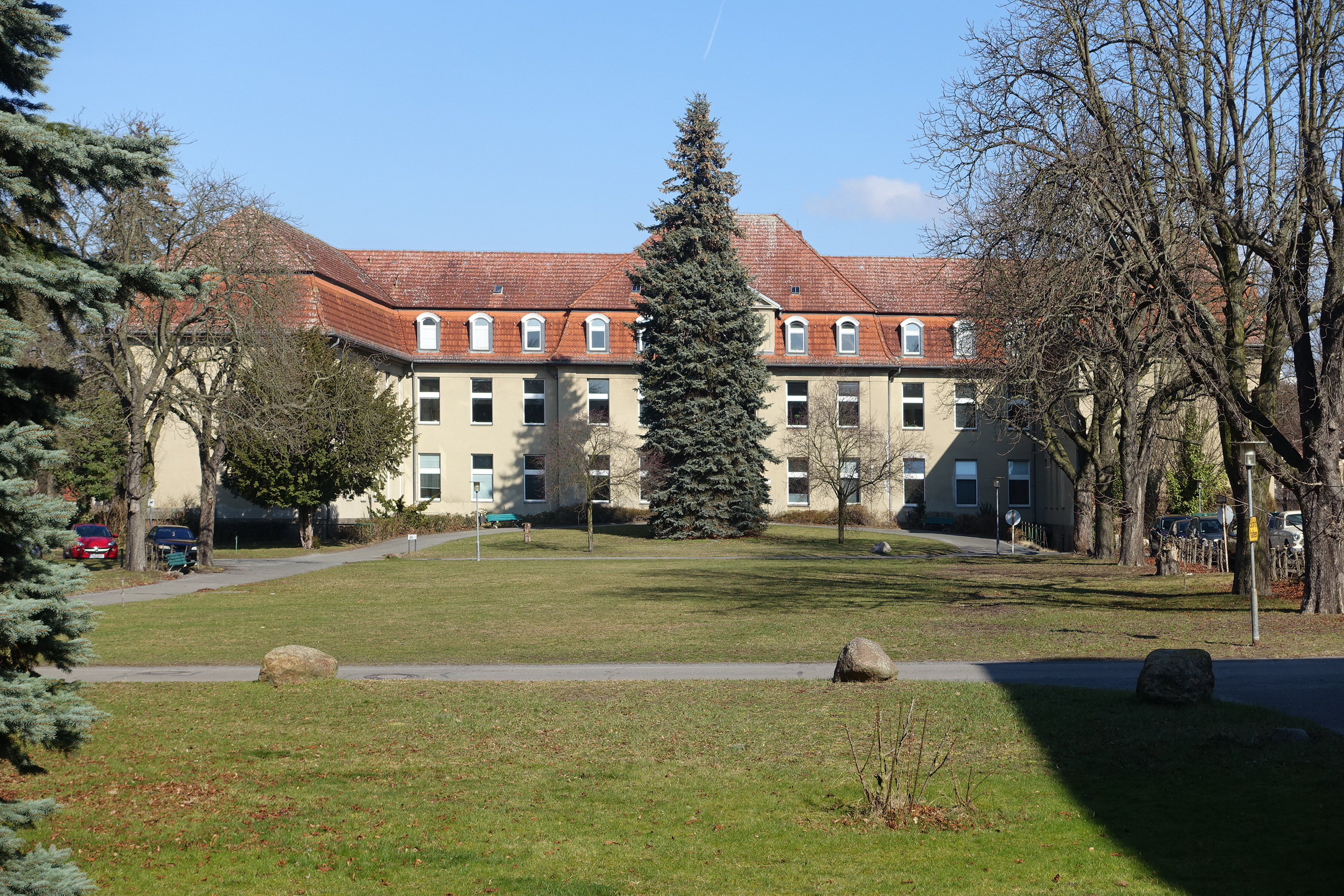 Krankenhausgarten